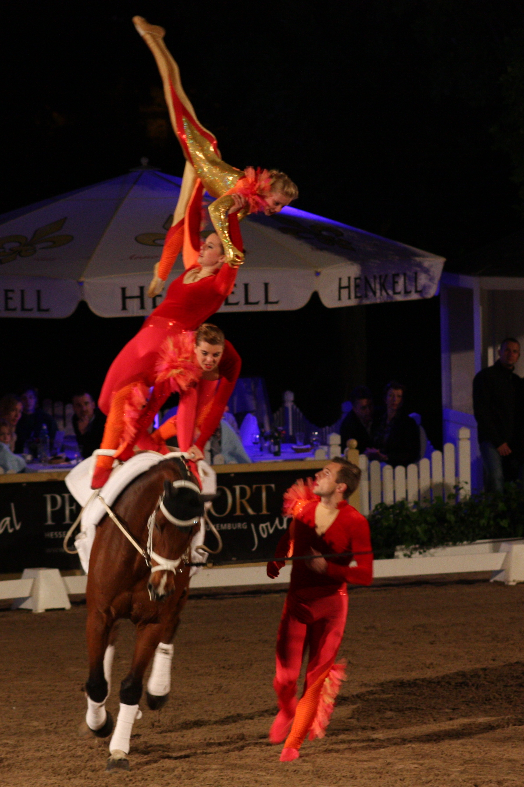 77. Internationales Pfingstturnier Wiesbaden 2013, CVI *** Voltigieren, VV Ingelsberg I mit Lazio 9 Personality rights warning Although this work is freely licensed or in the public domain, the person(s) shown may have rights that legally restrict certain re-uses unless those depicted consent to such uses. In these cases, a model release or other evidence of consent could protect you from infringement claims.